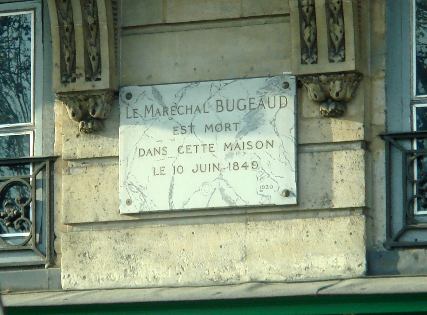 Marechal Bugeaud commemorative plaque, 1 Quai Voltaire, Paris